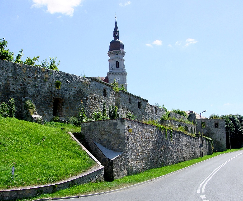 Nowogrodziec - klasztor, 2 poł. XVIII (magdalenek)